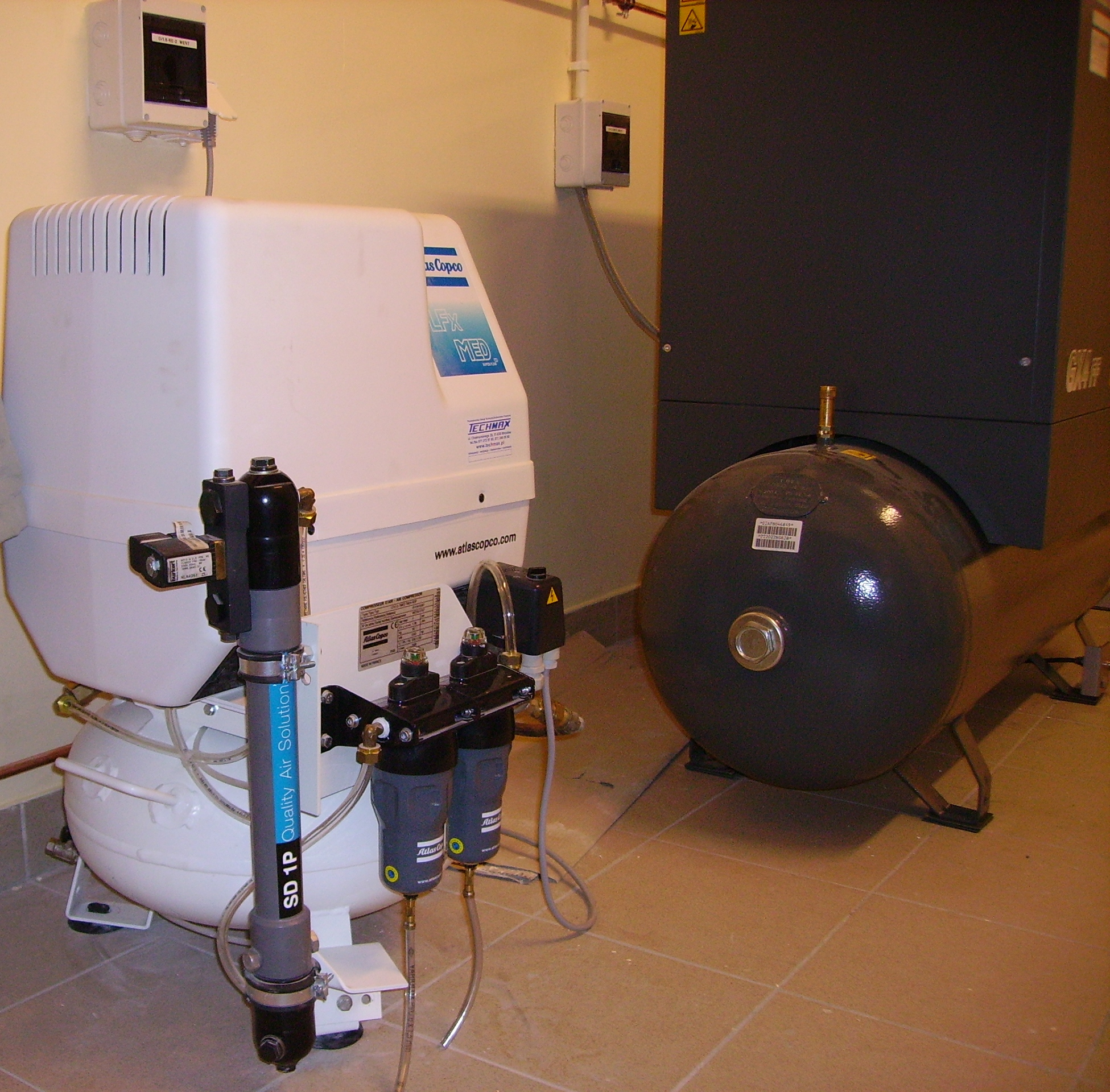 Sprężarka Tłokowa / Piston compressor